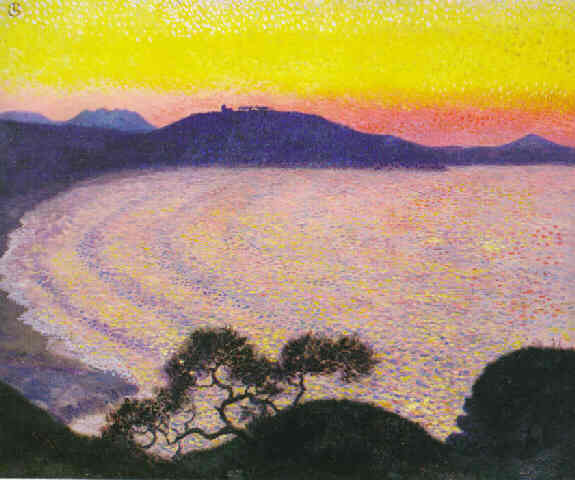 Georges Lacombe 1868-1916,la Baie ,1892, huile sur toile,51,1x62,5cm,coll privée